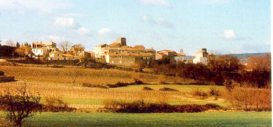 Vue du village de Gajan (Gard) de la route D907. Photo prise en hivers. On voit dominant le village la première tour du chateau. Photo prise par NacNac